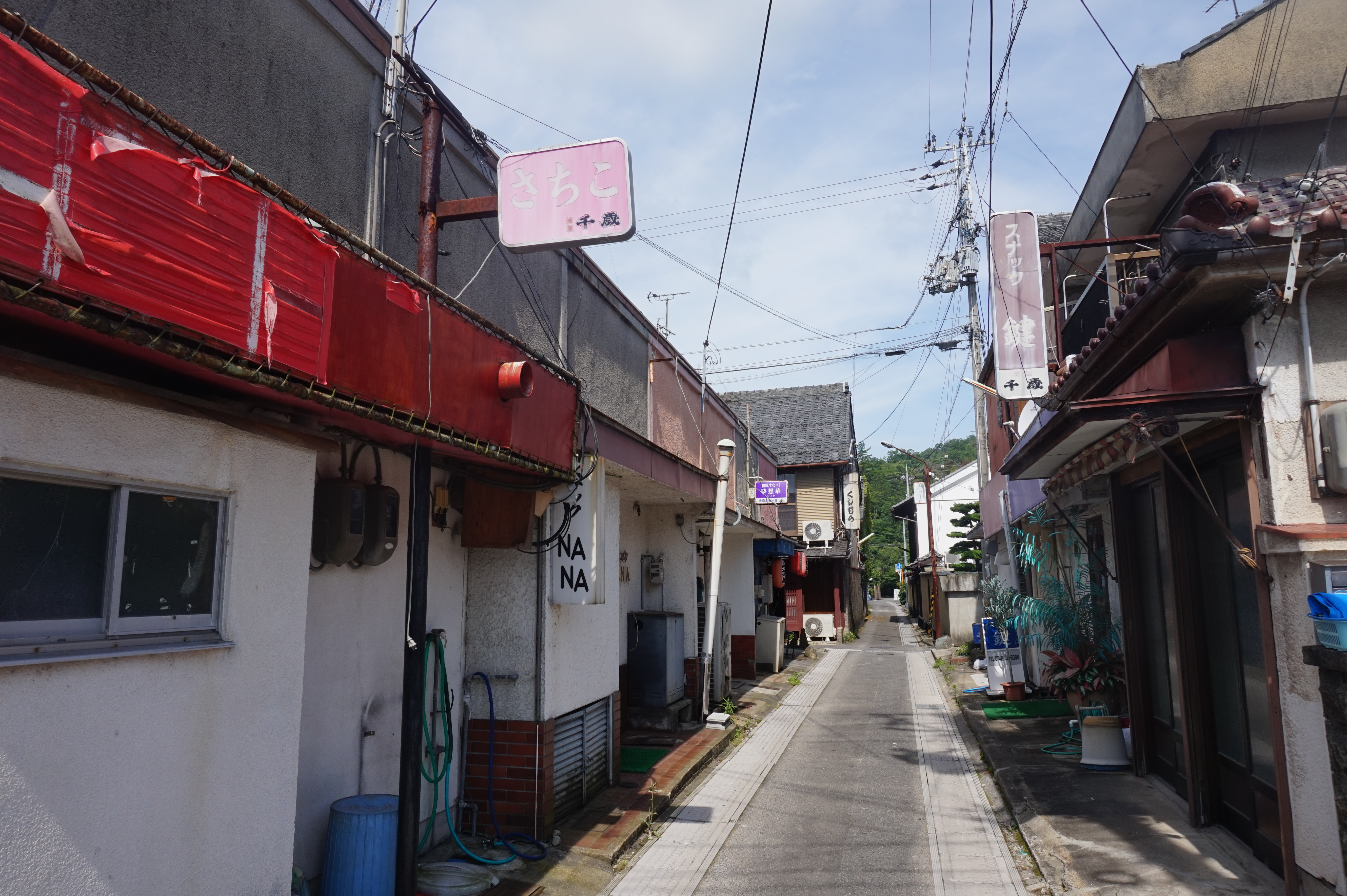 滋賀県東近江市の旧延命新地。